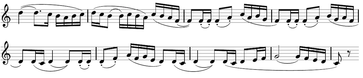 Conséquent du thème A du Boléro de Ravel